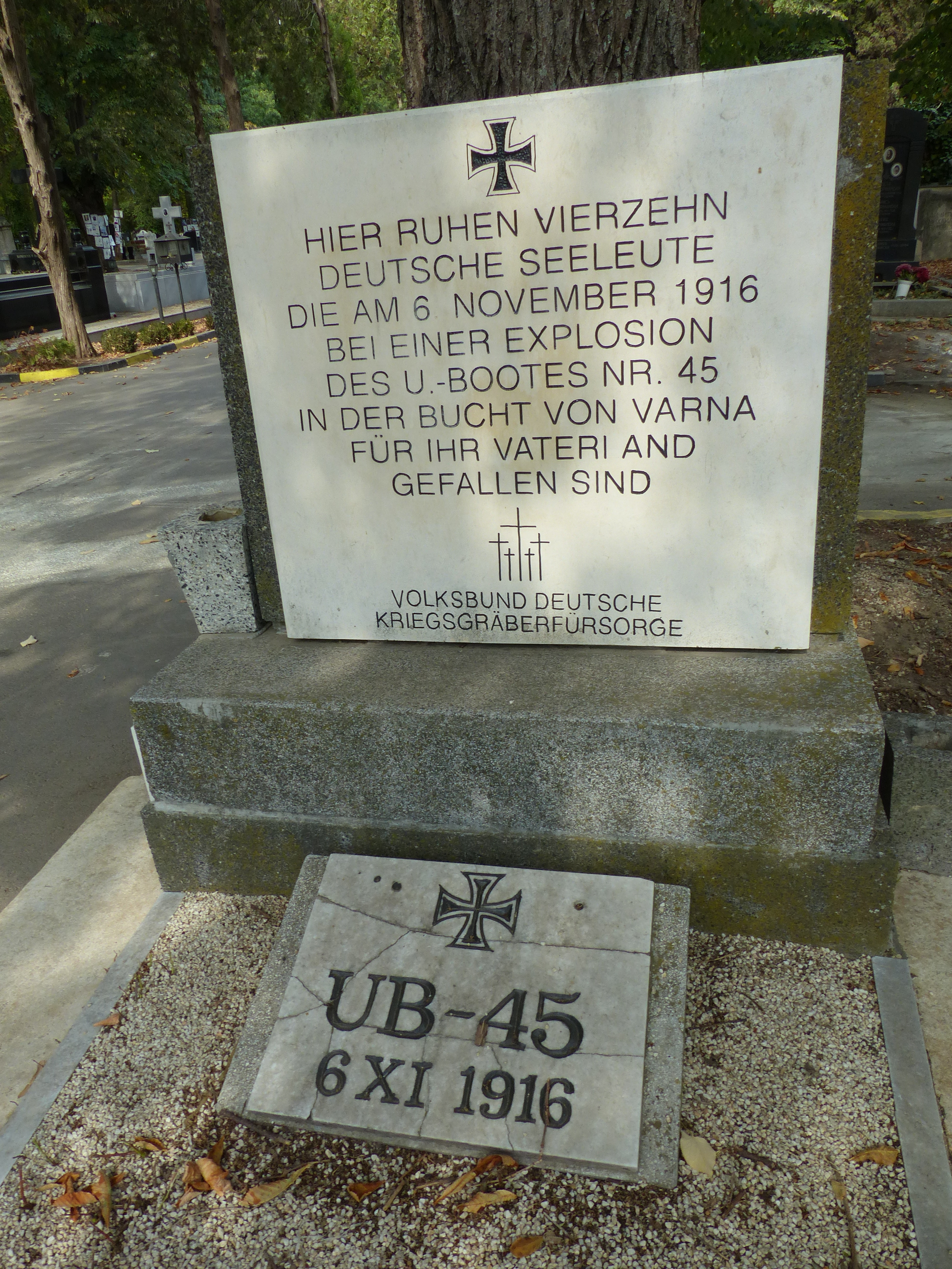 Kriegsgräberstätte Warna für die Besatzung des U-Boots SM UB-45